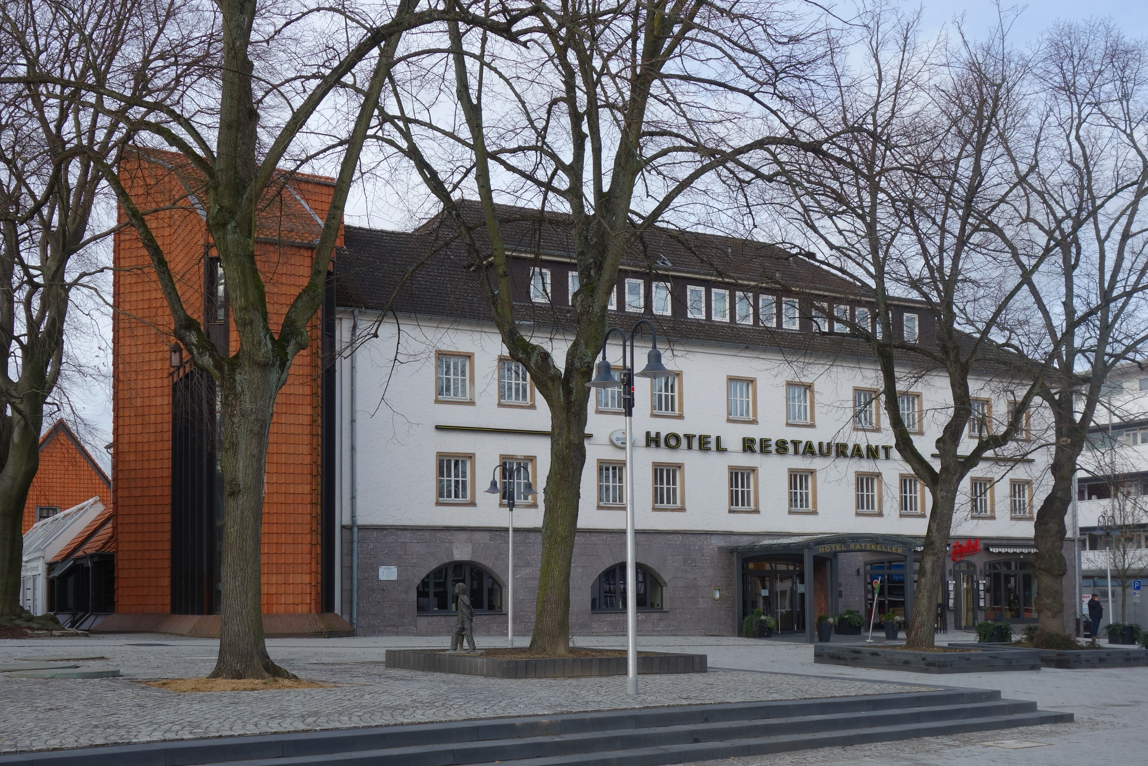 Ratskeller von Salzgitter-Bad - Ostseite mit Eingang (Marktplatz)